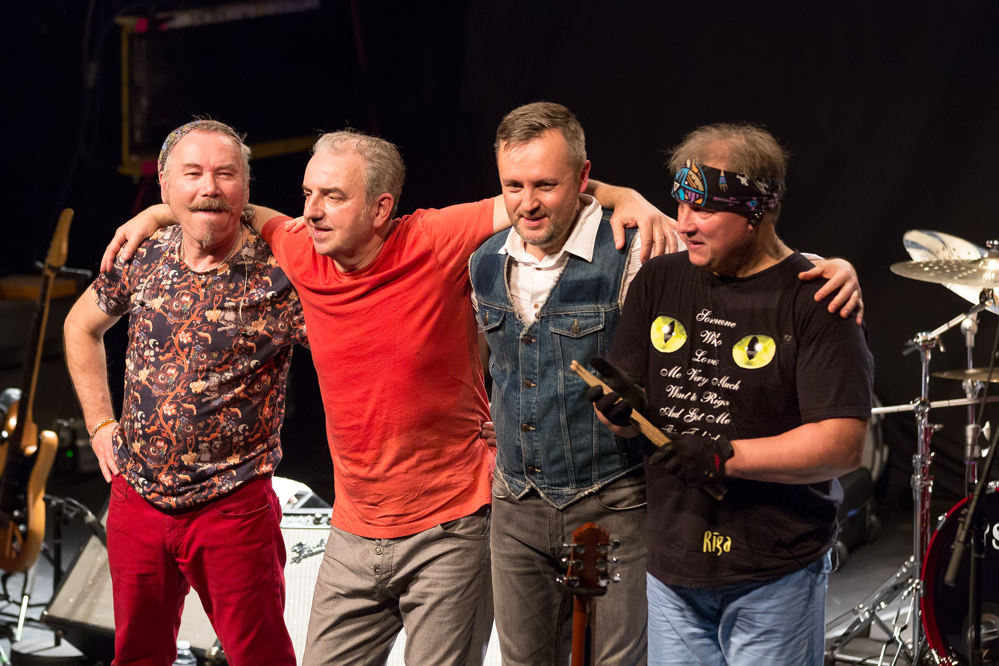 Группа "Чайф" на концерте "Вместе теплей" в "The Phoenix Concert Theatre". Торонто (02.11.2017)